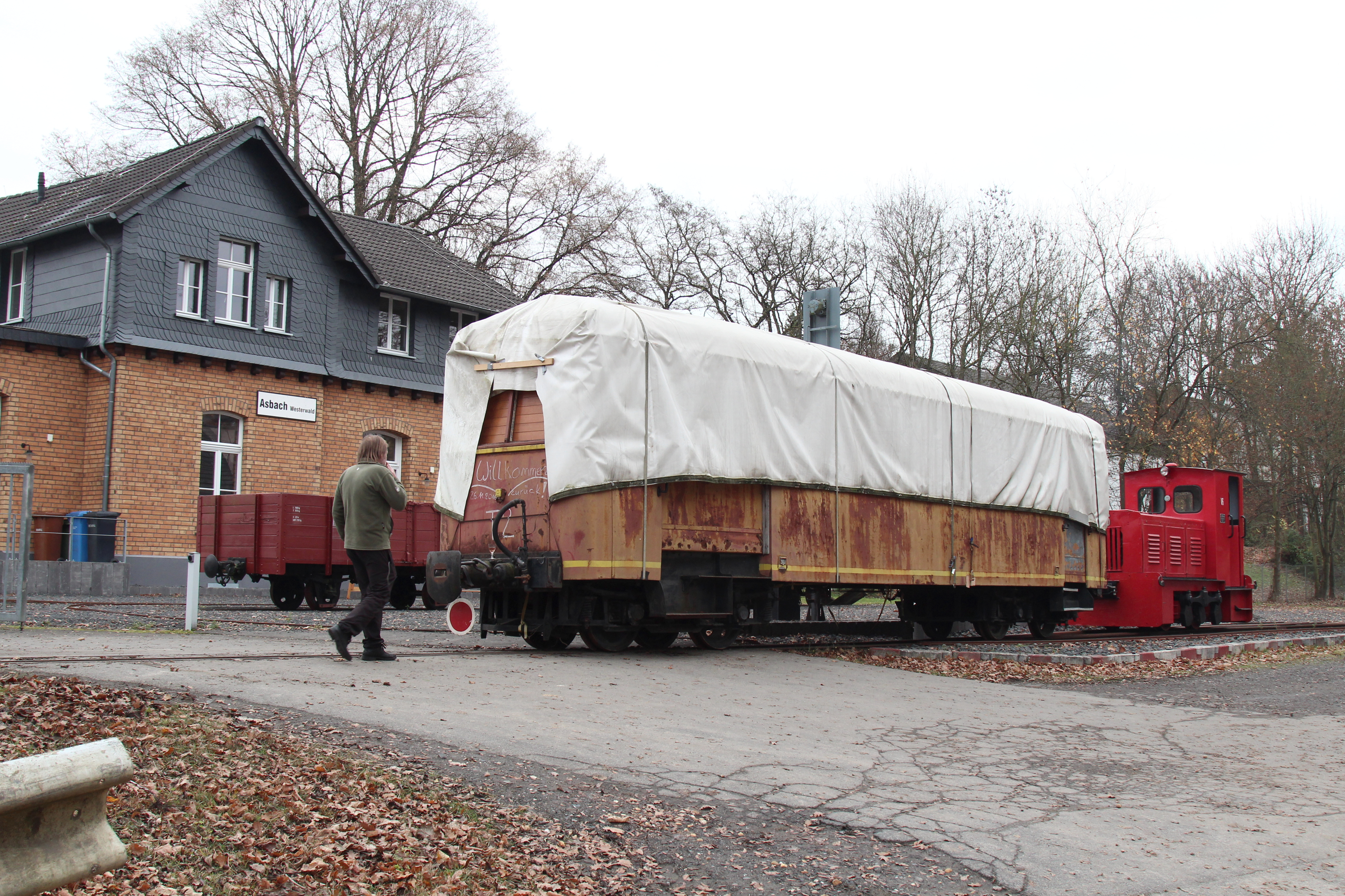 RSE Museum Asbach